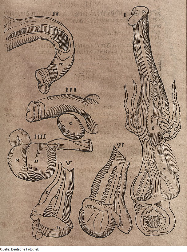 Original image description from the Deutsche FotothekBiologie & Veterinärmedizin & Pferd